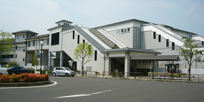 JR郡山駅 （奈良県大和郡山市） 撮影者-663Highland，撮影日-2005年8月6日